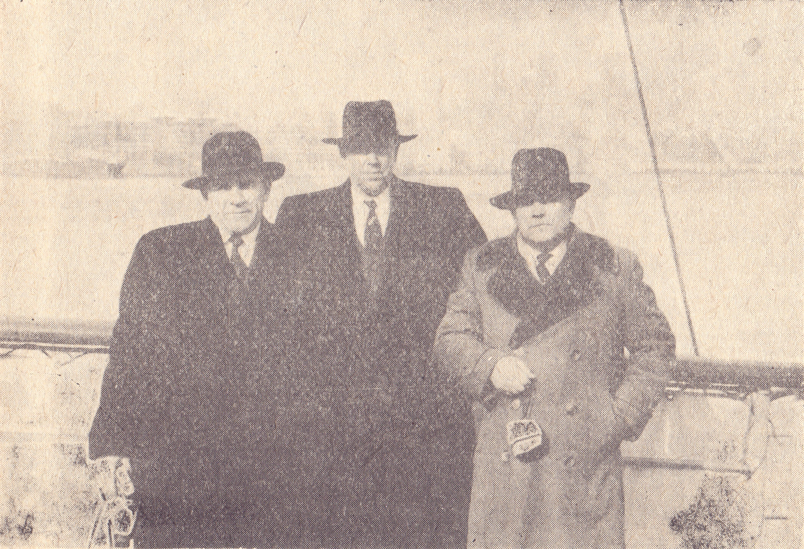 Podróż do Kanady w 1958, na pokładzie s/s "Atlantic", stoją od lewej: P. Bajeński, T. Maksymowicz, Sergiusz Waszkiewicz (E.Czajko, Ruch Zielonoświątkowy, w: Kalendarz Jubileuszowy, ZKE, 1963, s. 81)